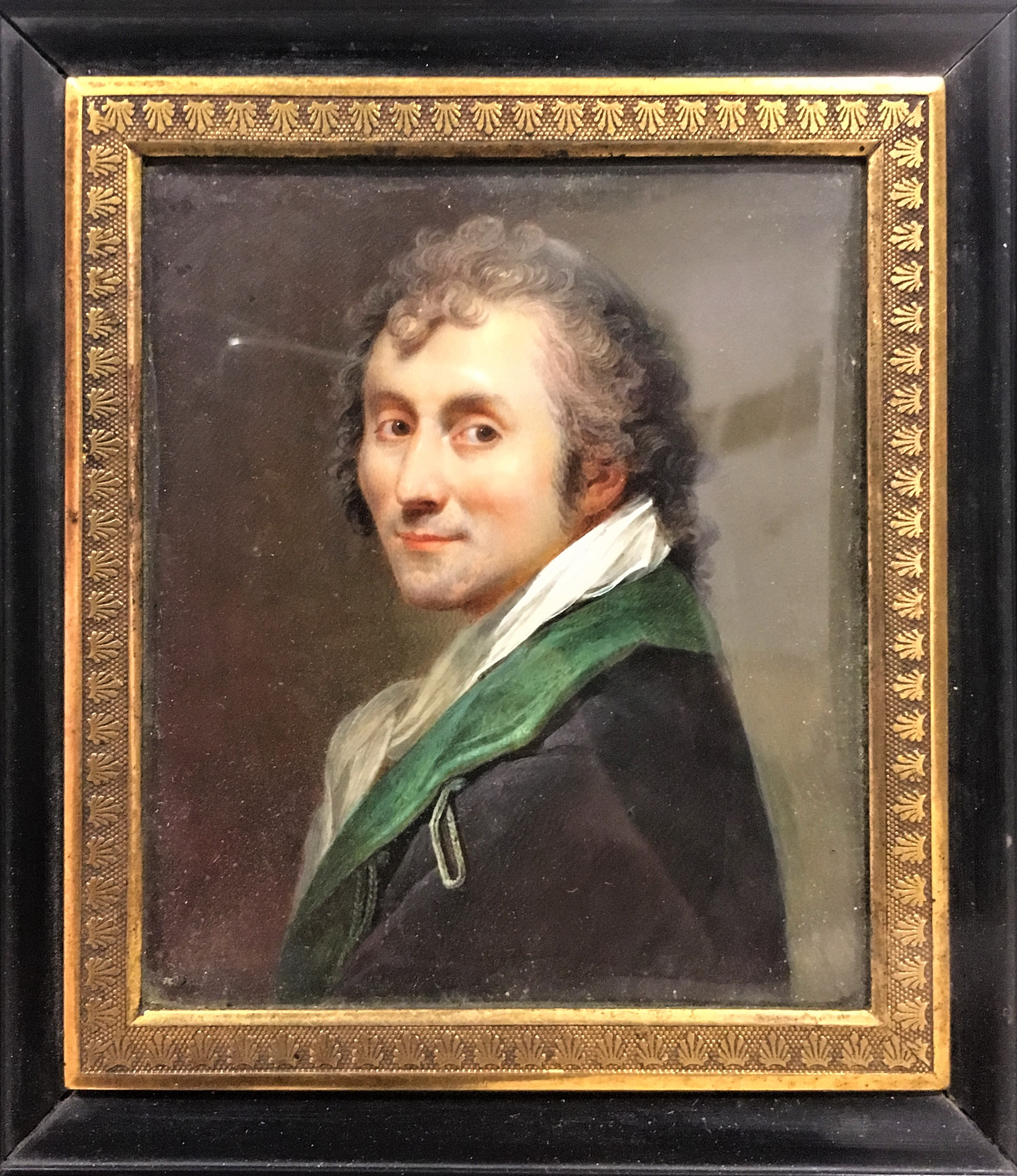 Miniature sur ivoire qui présente une réduction de l'autoportrait de l'artiste.